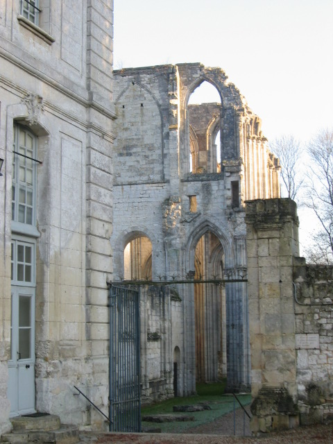 Abbaye de Saint-Wandrille, Seine-Maritime, Haute-Normandie / Photographie personnelle prise par Urban, décembre 2004/